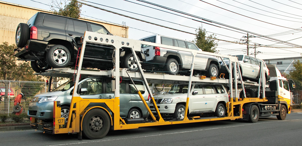 Car transporter